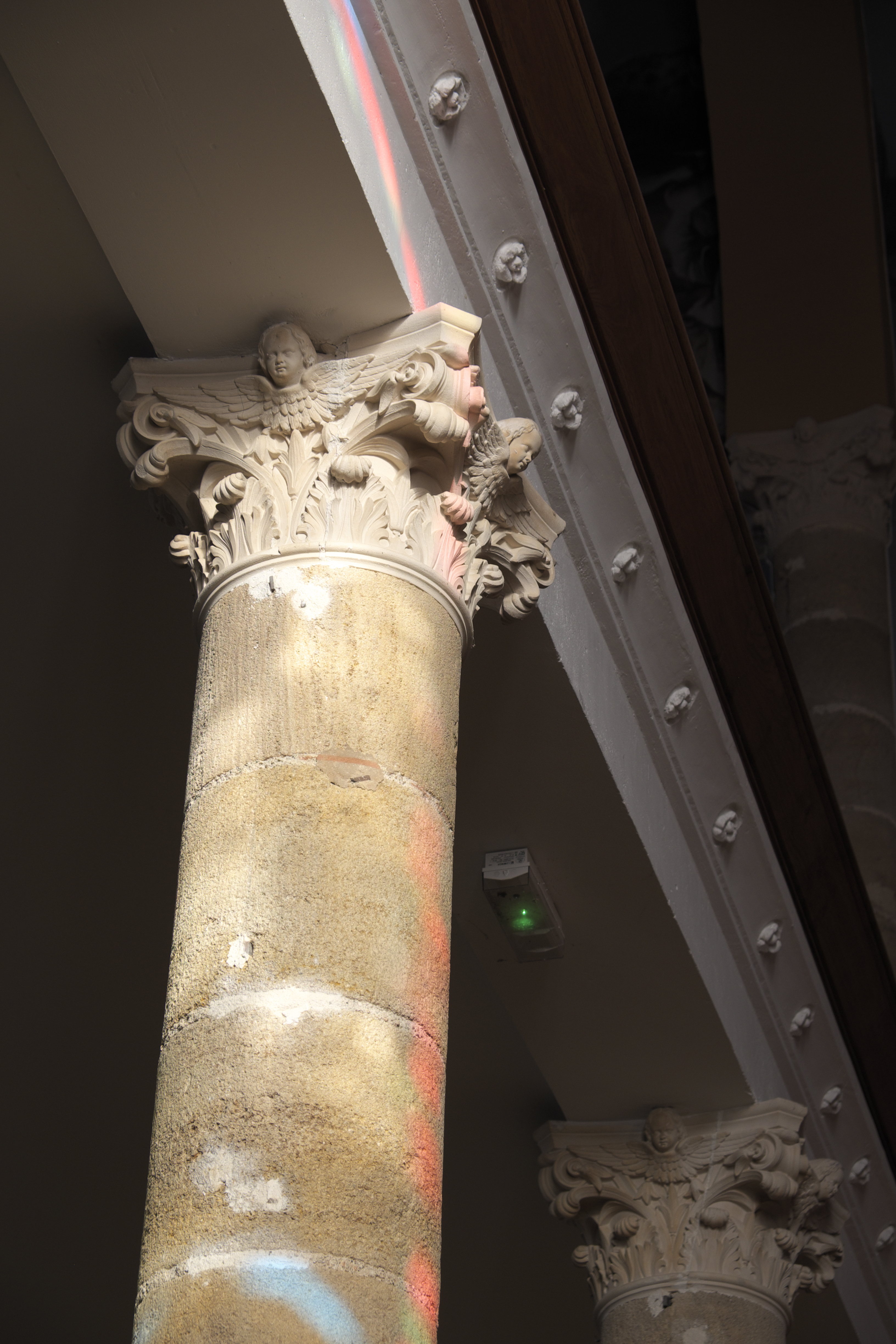 Ehemalige Kapelle Notre-Dame, heute Veranstaltungssaal des Hôtel de Paris, 21 rue de Paris, in Moulins im Département Allier (Auvergne-Rhône-Alpes/Frankreich), Kapitell